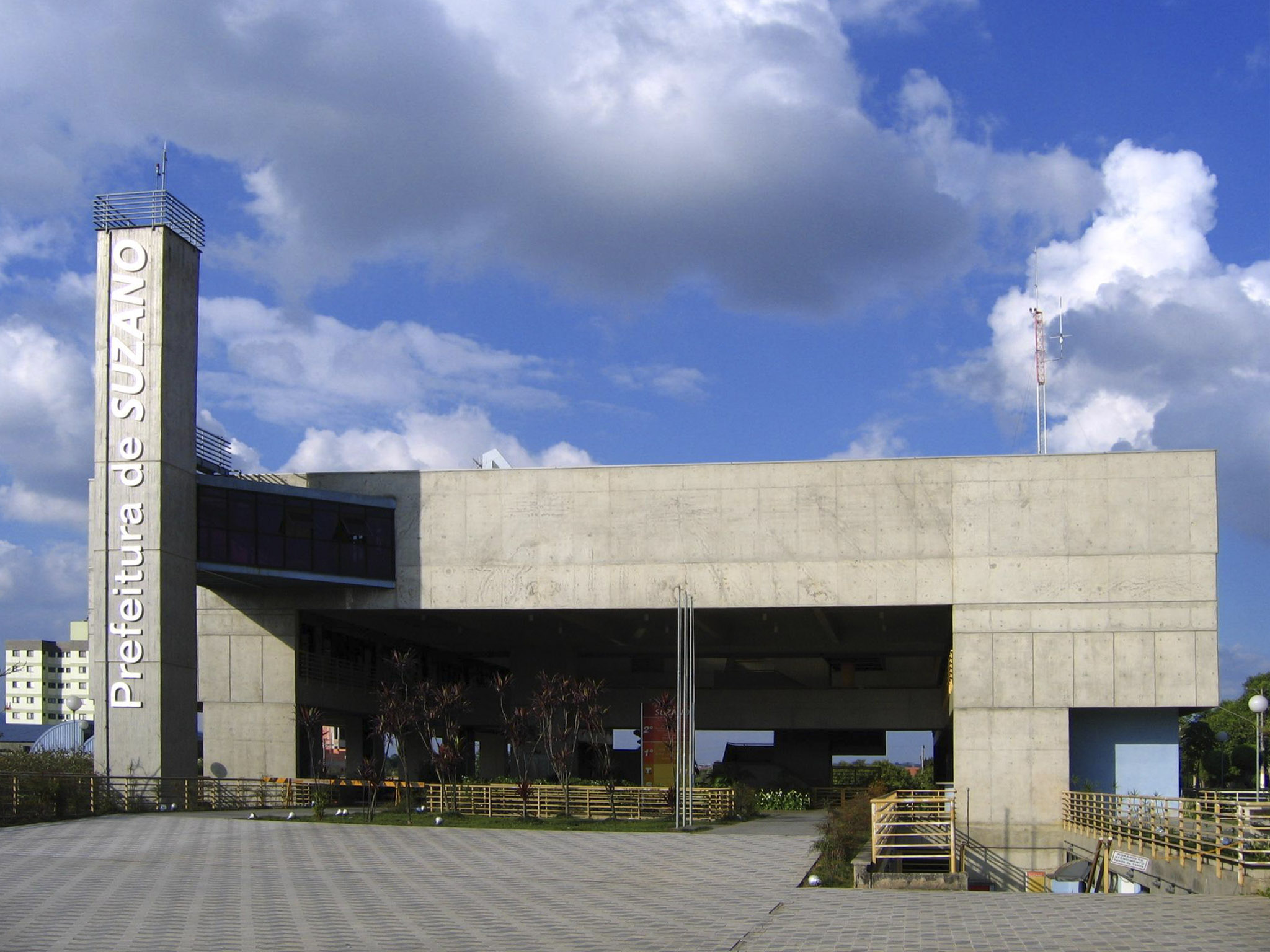 Sede da Prefeitura de Suzano